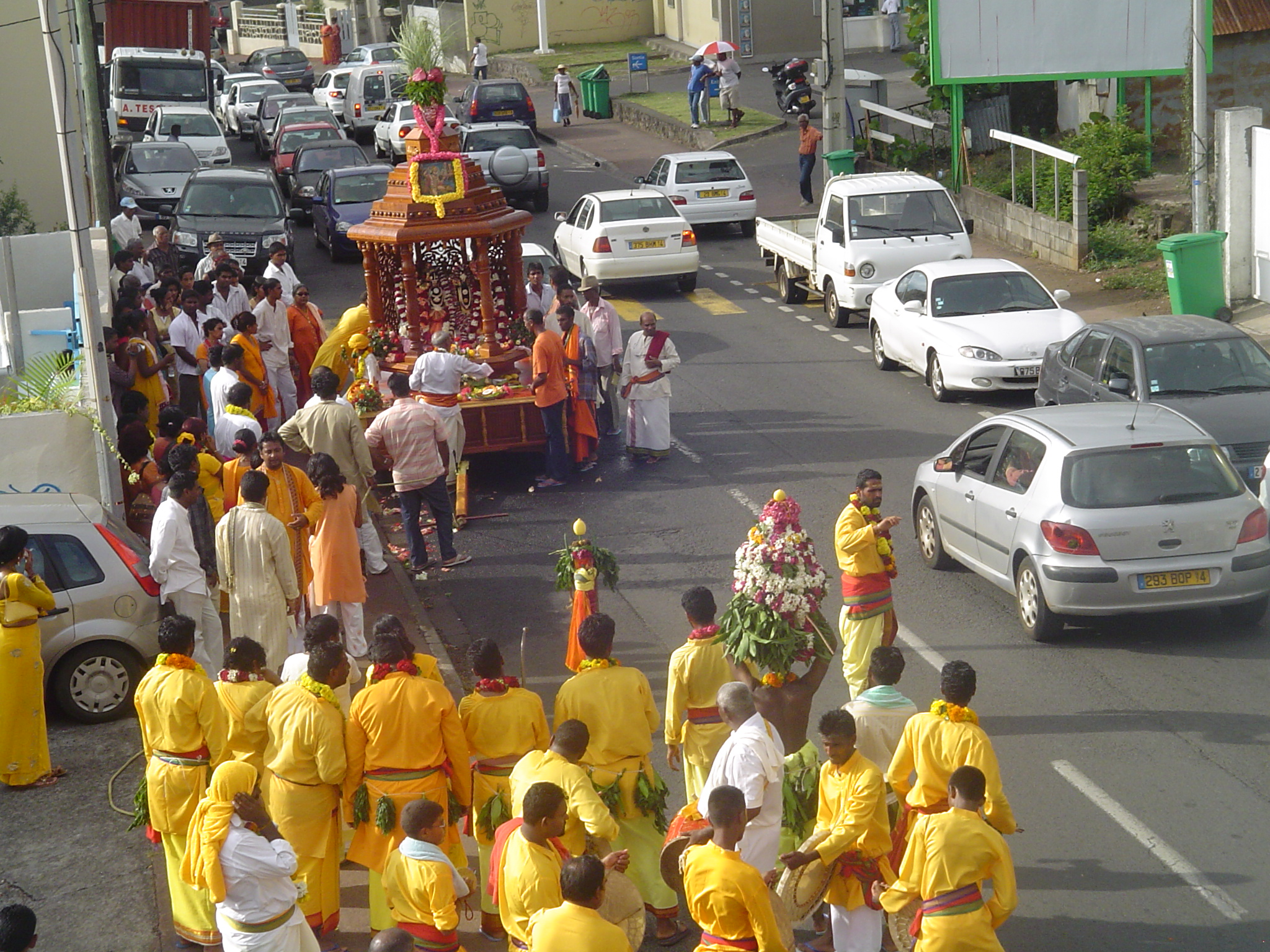 Défilé Tamoul à Terre-Sainte